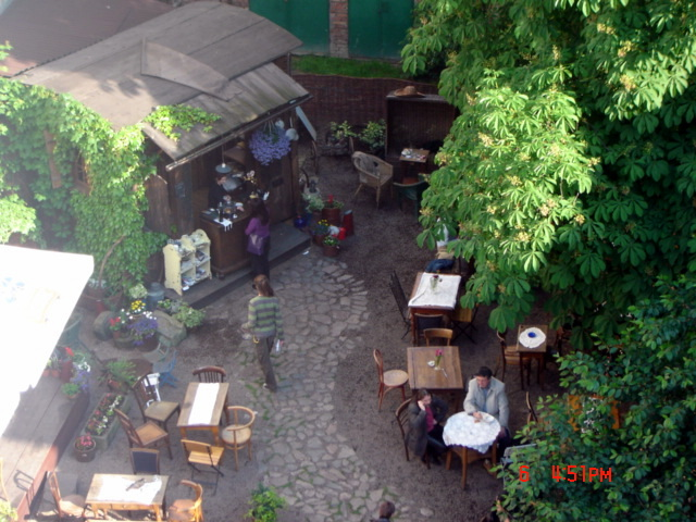 Ogródek kawiarni Mleczarnia